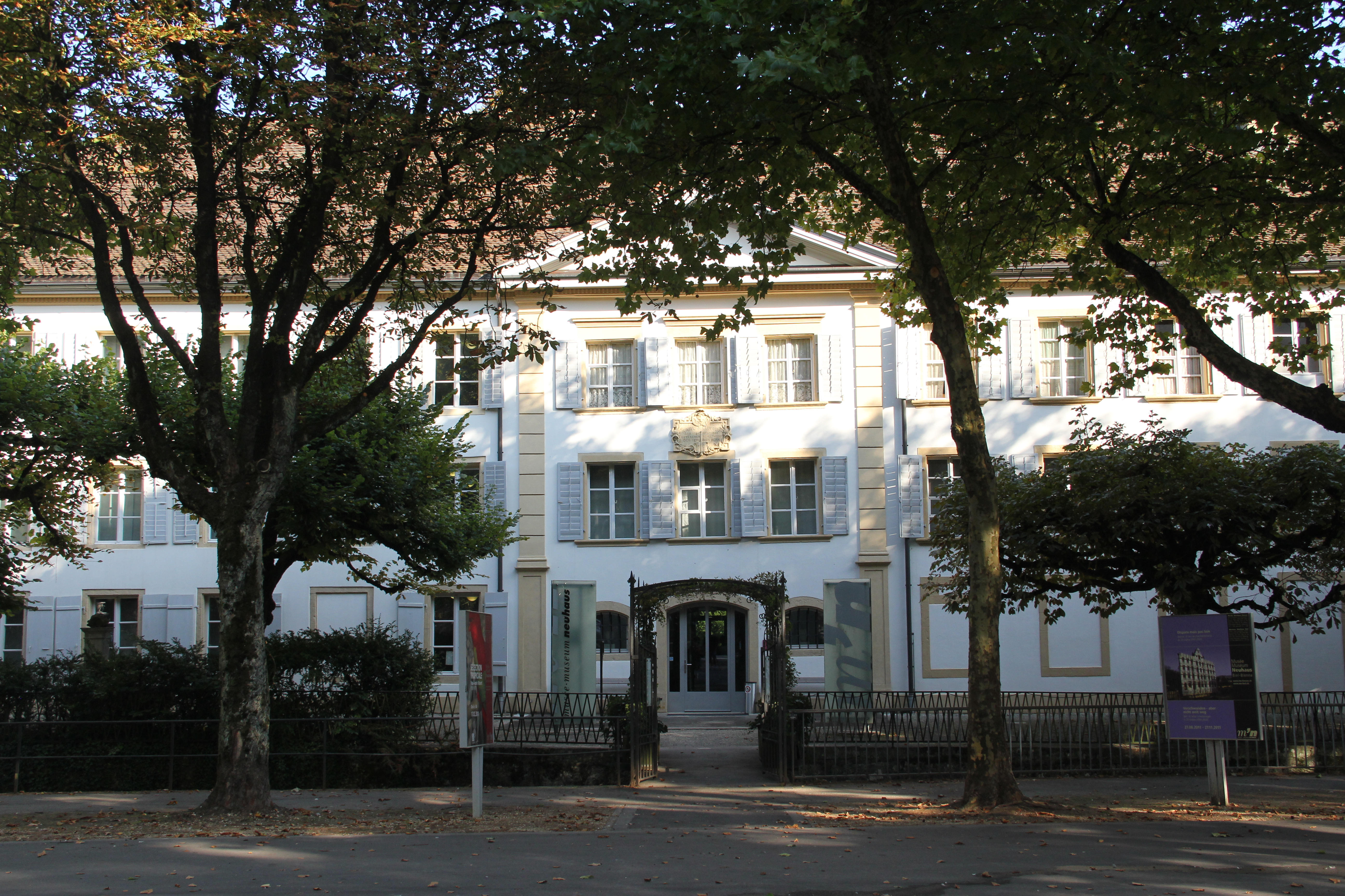 Eingang zum Museum Neuhaus Biel.